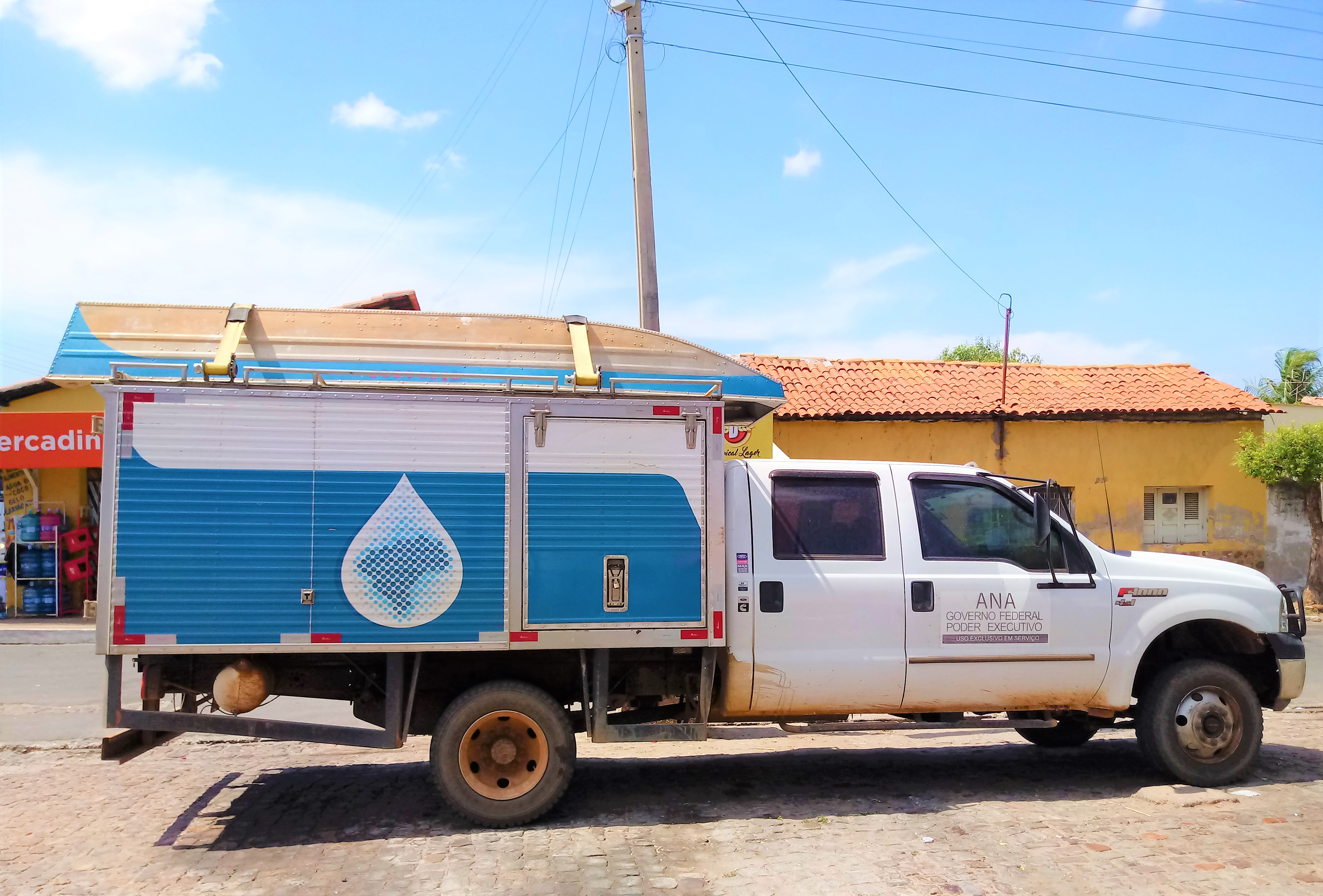 Veículo de serviço da Agência Nacional de Águas no Piauí.